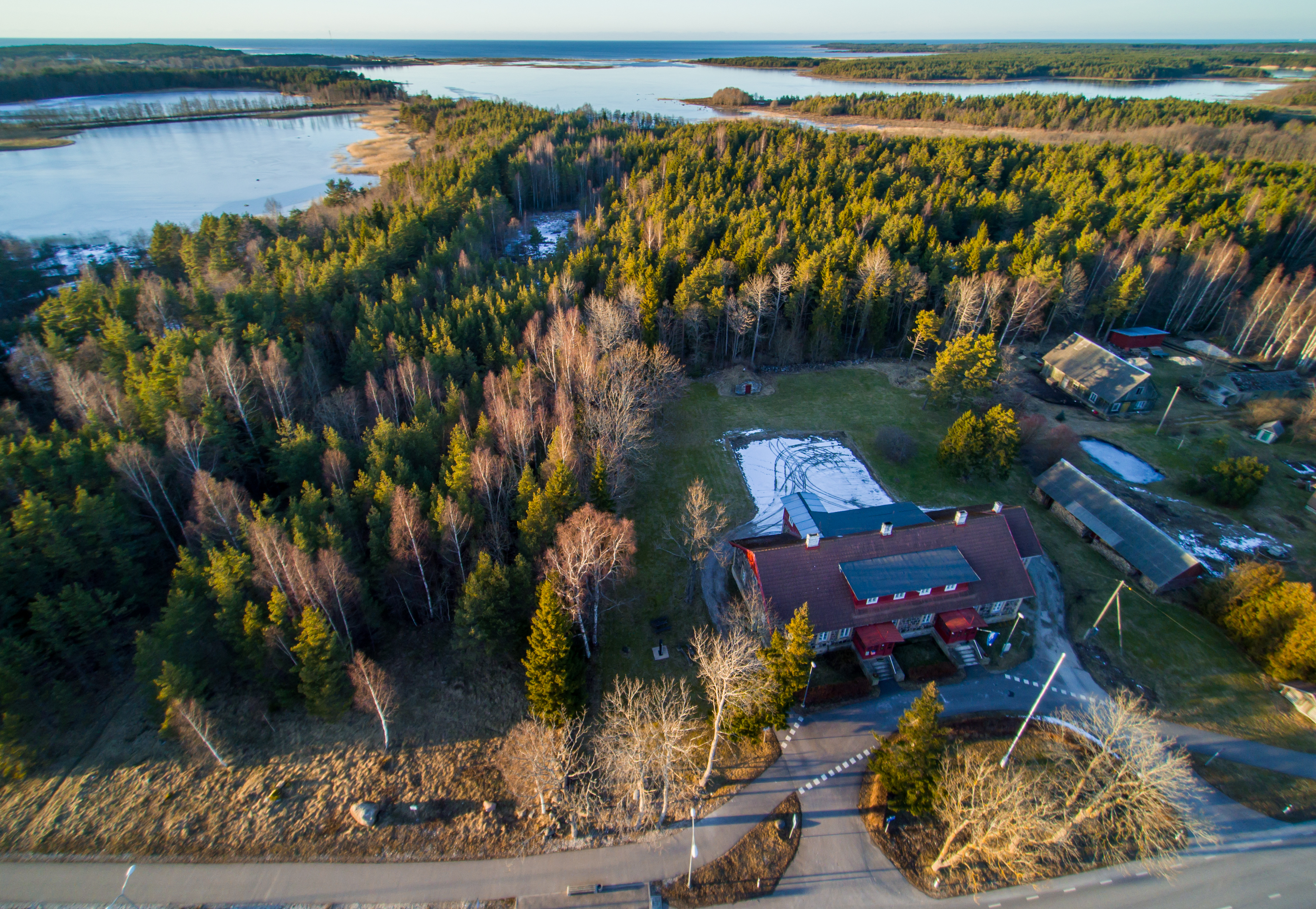 Kõrgessaare vallamaja 2016